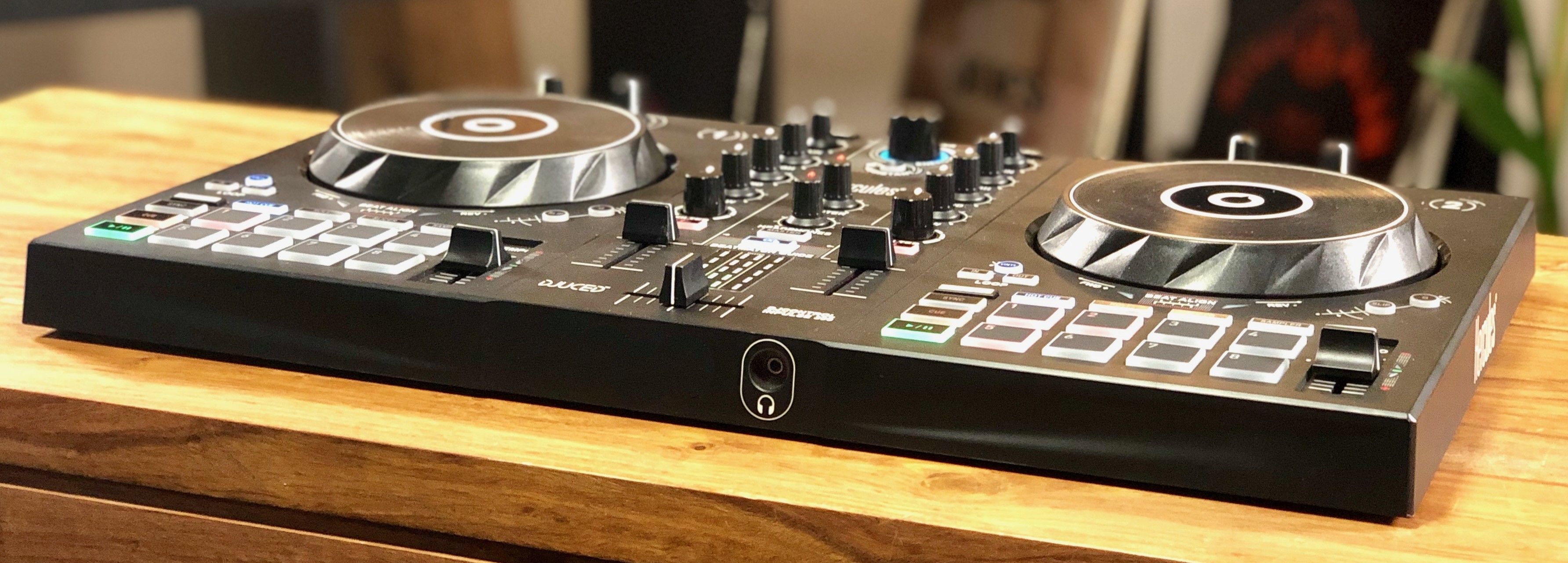 Contrôleur DJ sur un banc